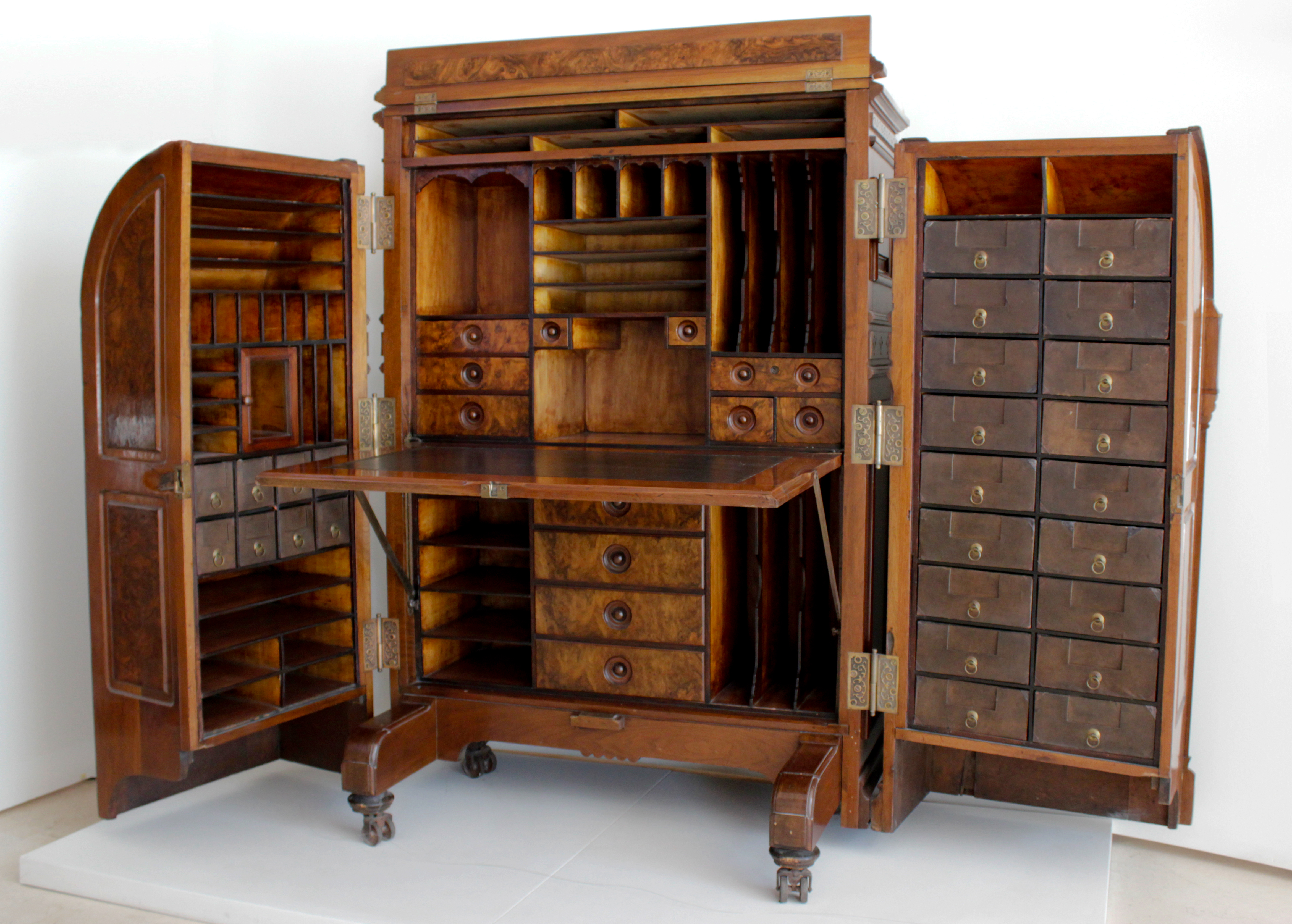 Secreter que perteneció al Presidente Domingo F. Sarmiento. Manufactura Wooton, Indianápolis, Estados Unidos. Patente año 1875. Escritorio y archivo que presenta un diseño de avanzada, como confortable "ordenador" para facilitar tareas. Importado de los Estados Unidos de Norteamérica, llegaron a la Argentina hacia el año 1876 varios muebles similares, que se destinaron a las autoridades de importantes organismos estatales.